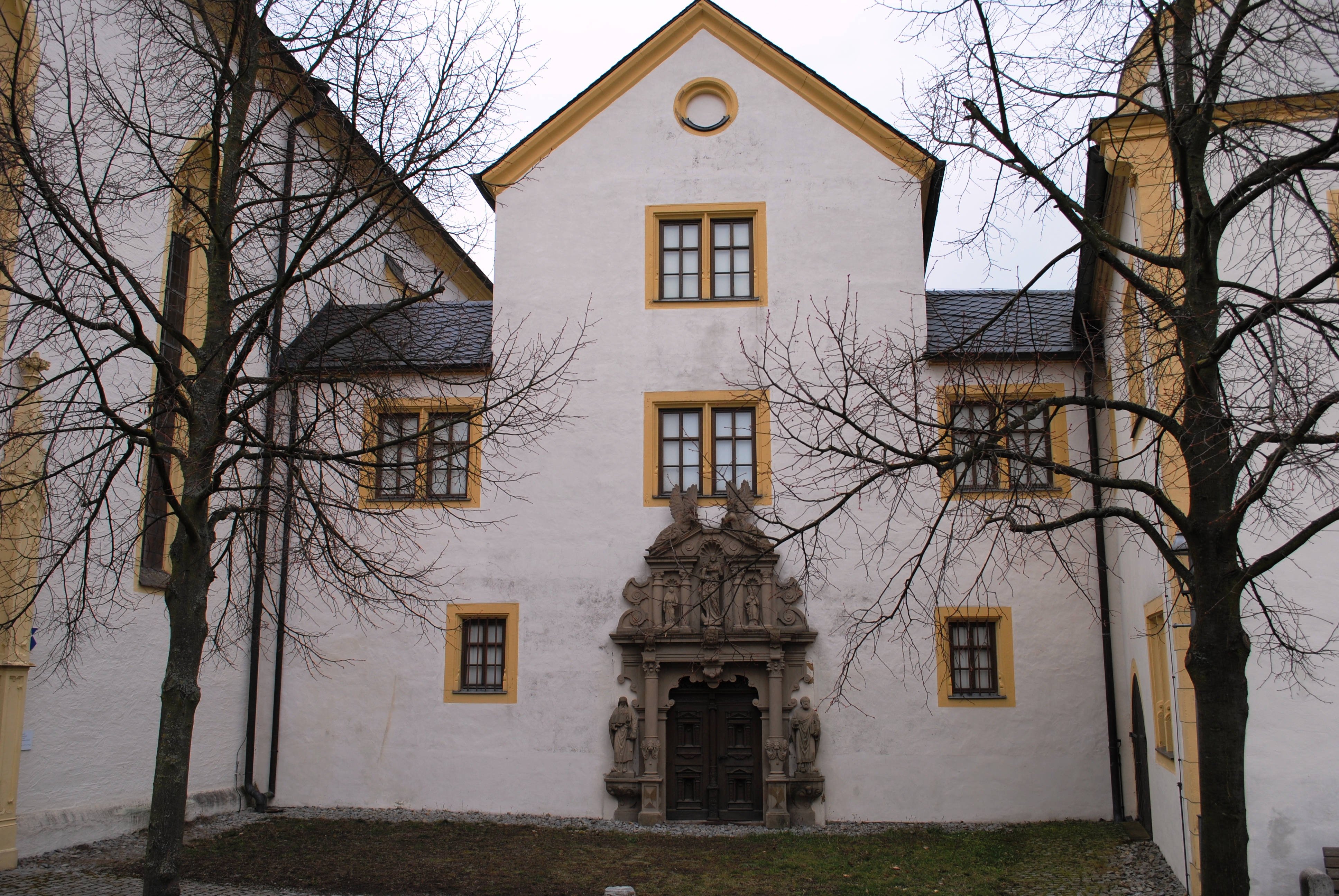 Verbindungsbaus, Kartause Astheim, Volkach